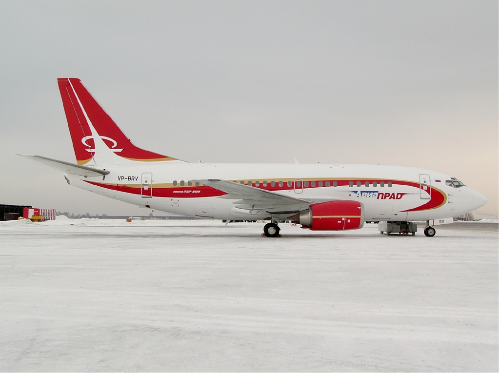 VP-BRV, Aviaprad Boeing 737-500, Tolmachevo